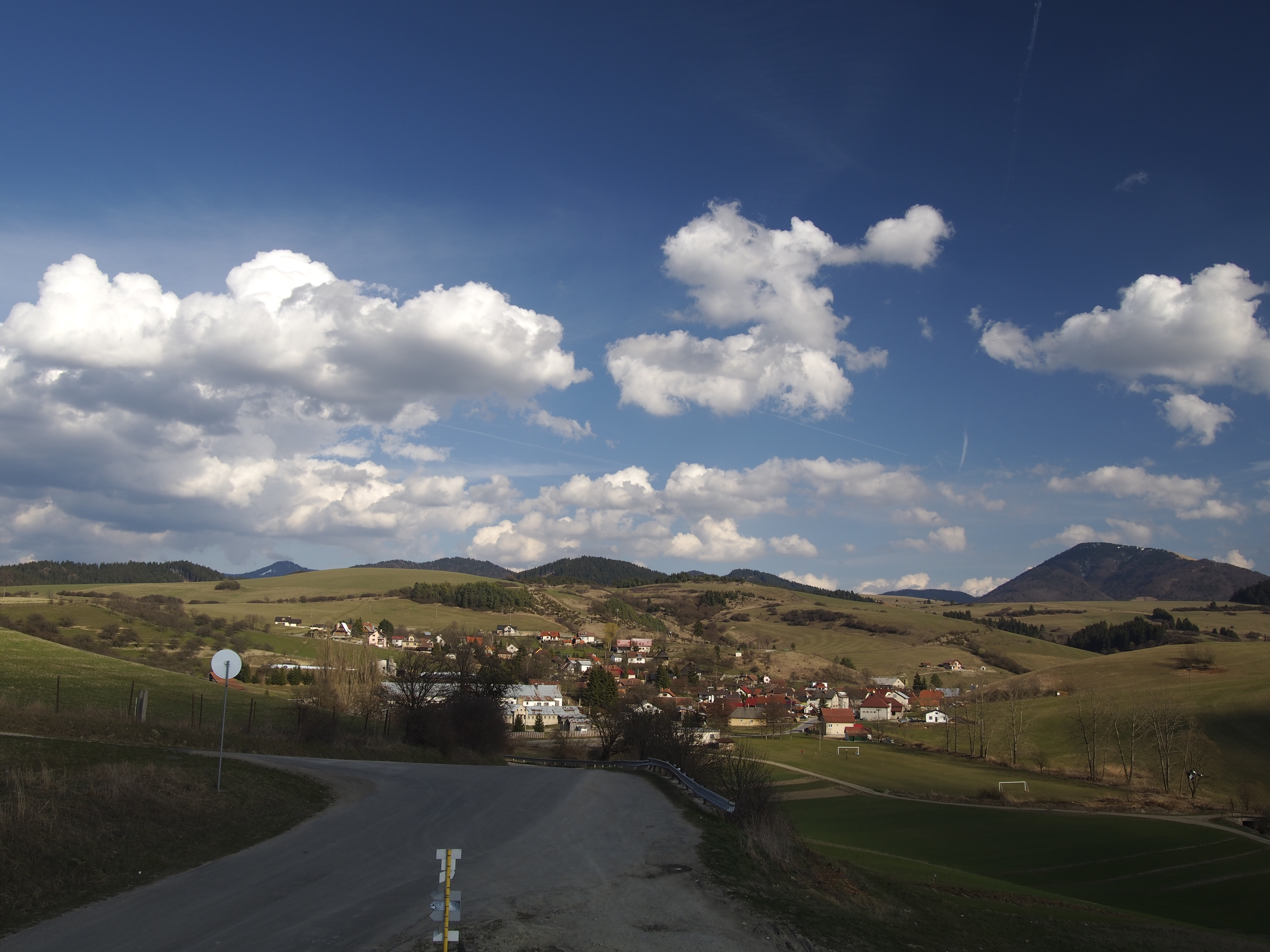 Turčianske Jaseno, marec 2016